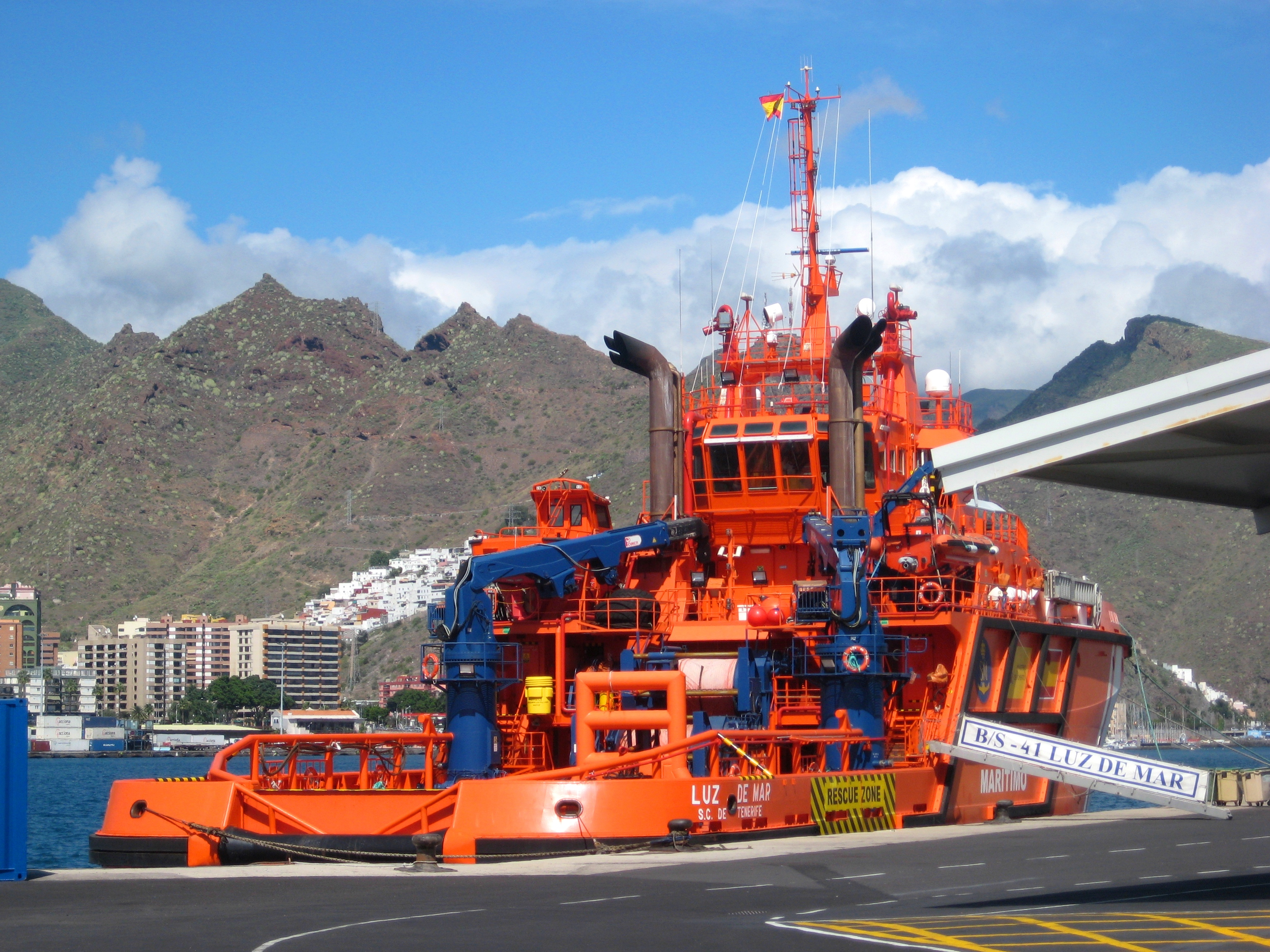 Buque de la Sociedad de Salvamento y Seguridad Marítima "Luz de Mar". IMO Number: 9320104 MMSI Number: 224311000 Callsign: ECIJ Length: 56 m Beam: 15 m